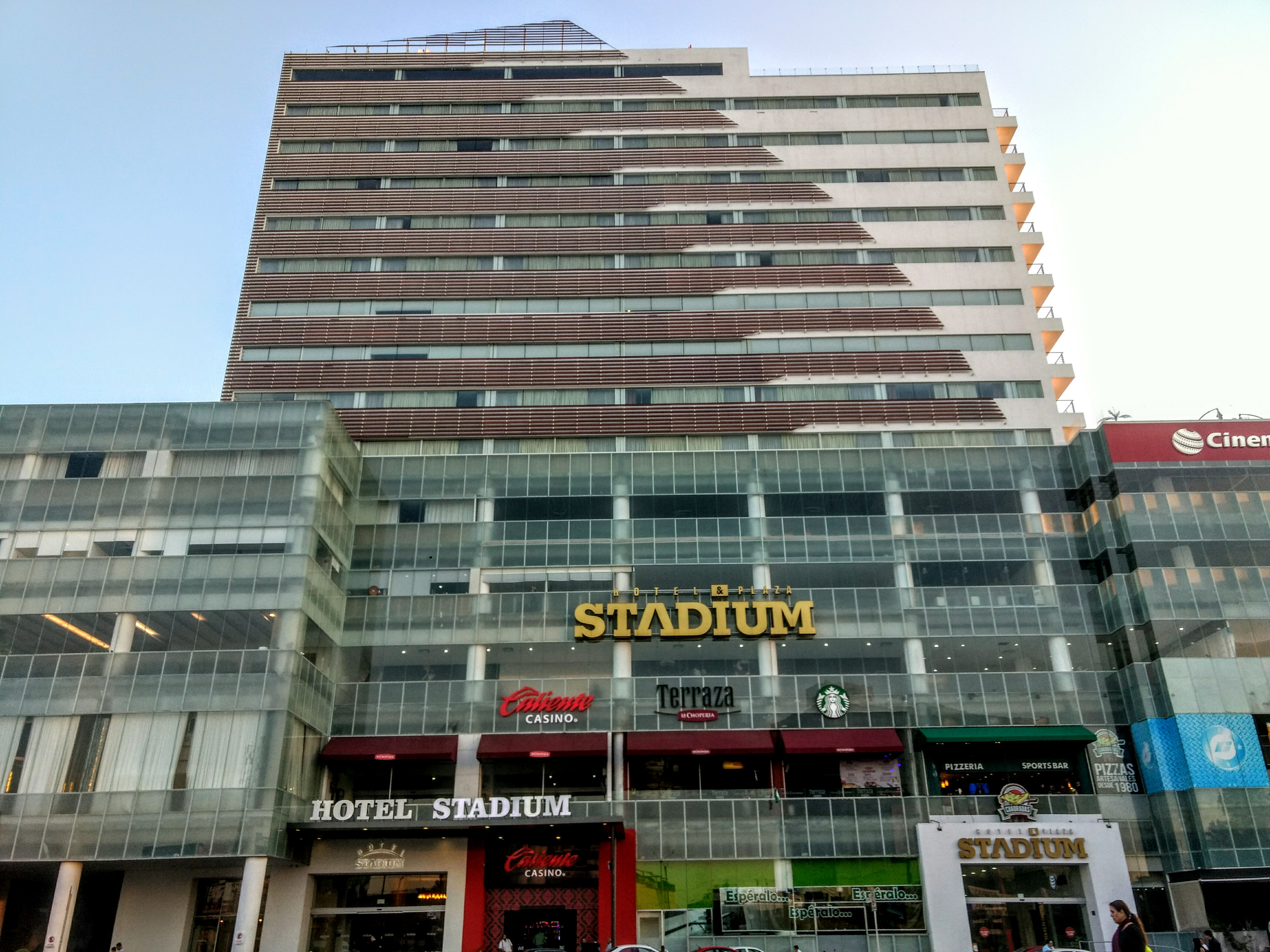 Plaza Stadium.